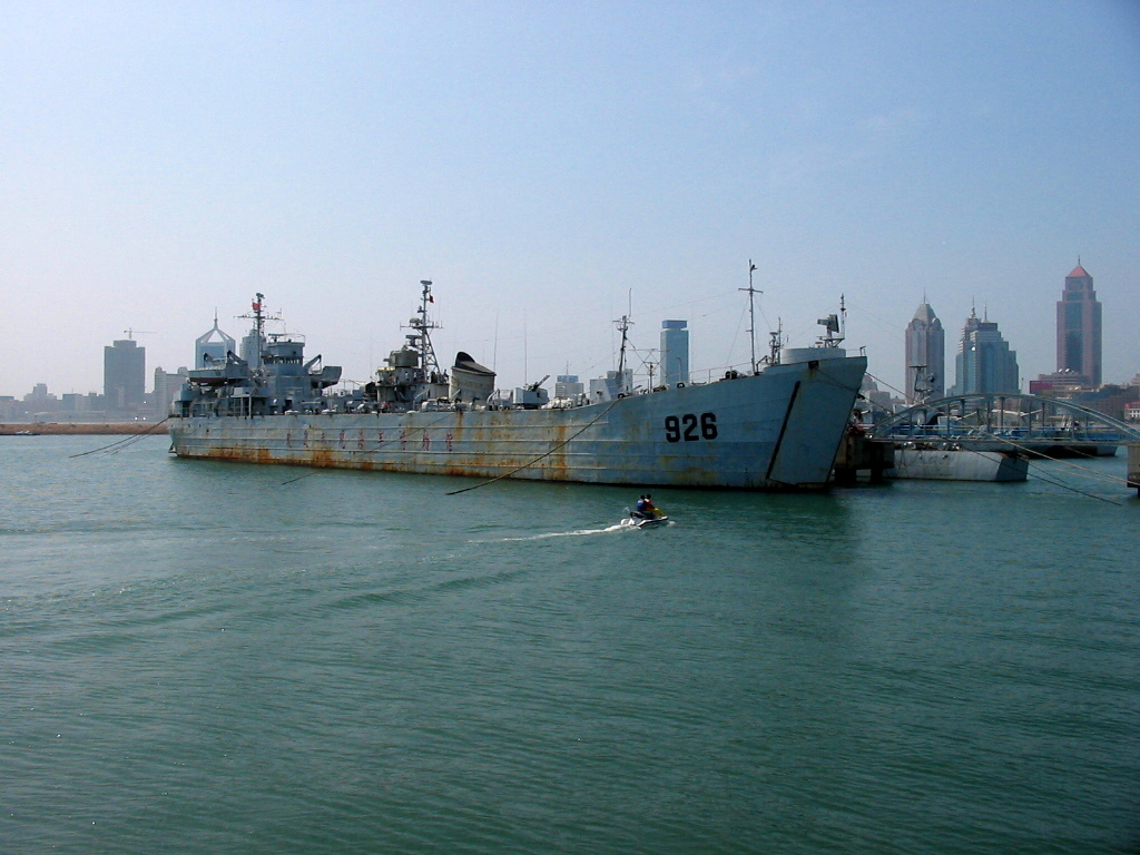 青岛海军博物馆 - 大型登陆艇大别山号（舷号926）